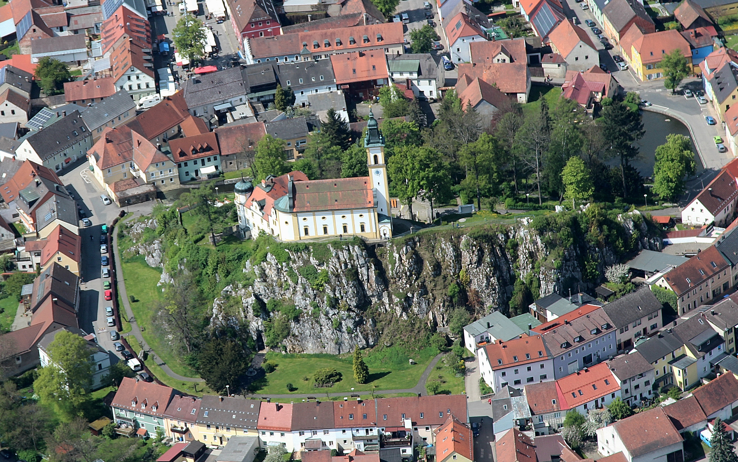 Pleystein, Wallfahrtskirche Heiligkreuz (Kreuzbergkirche), Landkreis Neustadt an der Waldnaab, Oberpfalz, Bayern